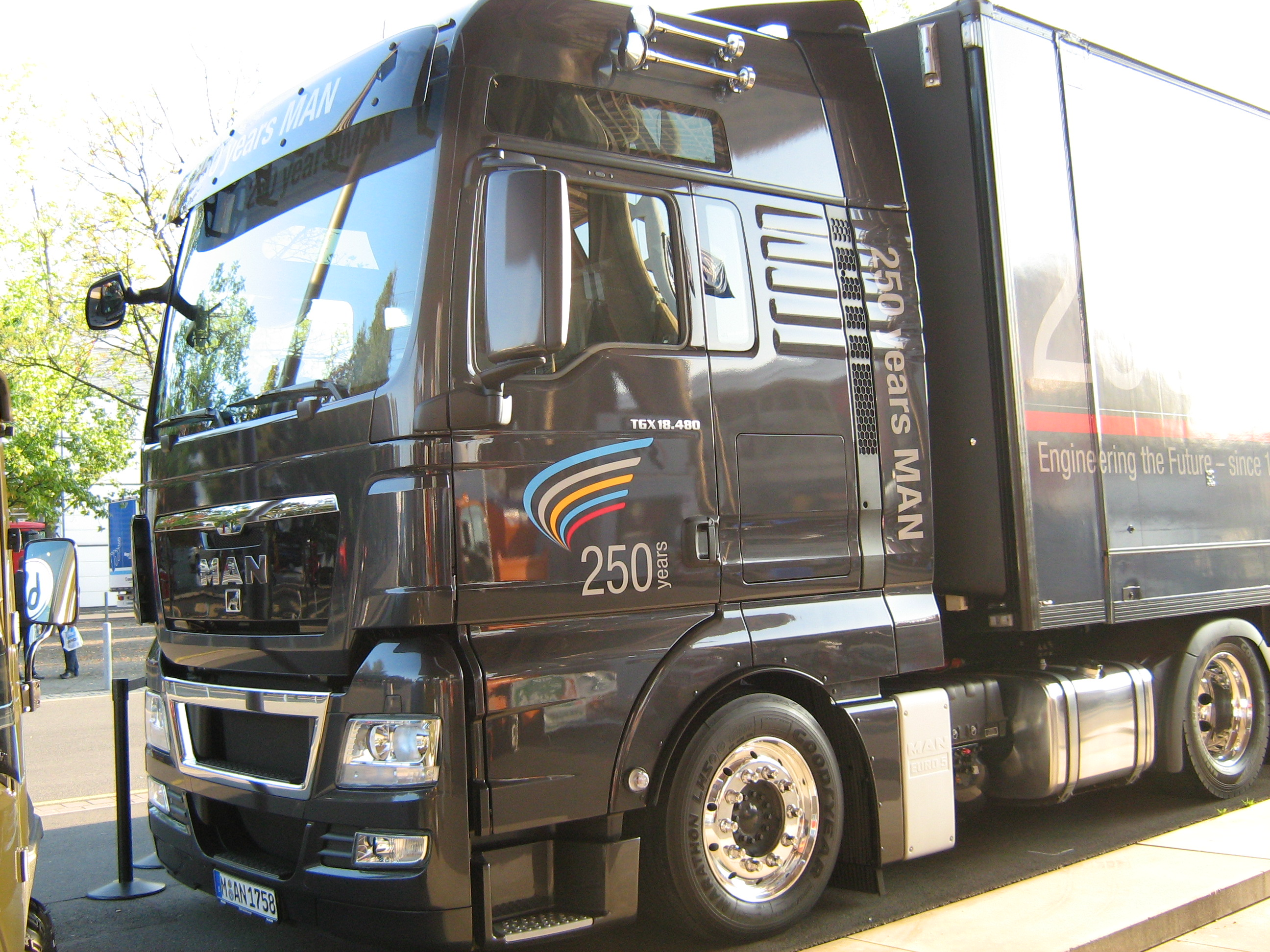 MAN TGX 18.480, 250 Jahre MAN auf der IAA 2008.